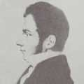 Juan Francisco Larraín Rojas; (Santiago, 11 de julio de 1788 - 28 de enero de 1836). Hijo de Francisco de Borja Larraín Lecaros y Agustina de Rojas Gamboa. Hermano del ex parlamentario Nicolás Larraín Rojas. Contrajo matrimonio en 1812, con María Mercedes Gandarillas Aránguiz. Uno de sus hijos también fue parlamentario, Patricio Larraín Gandarillas. Dueño de la hacienda de Aculeo. Su cuñado, Joaquín Gandarillas Aránguiz, le reemplazó en el Congreso en 1825, por la zona de Rancagua y Maipo.